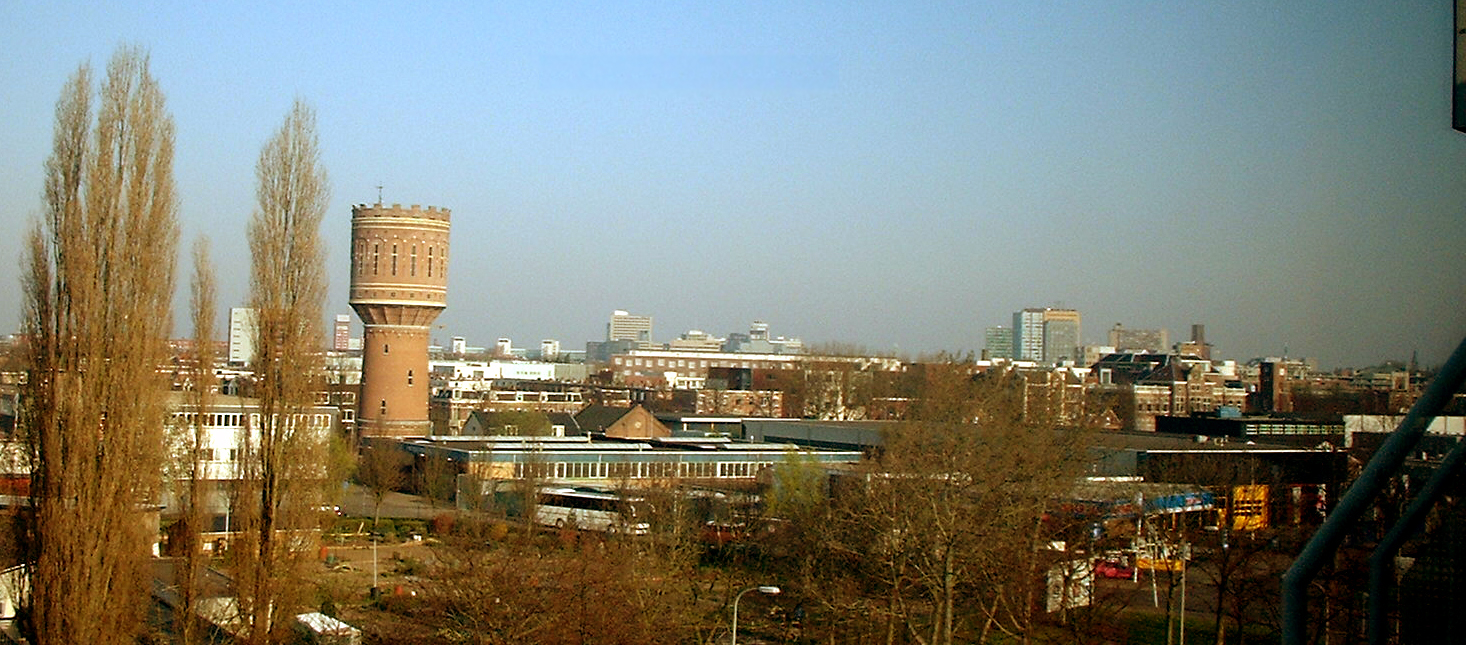 Uitzicht over Rotsoord in Noord-Westelijke richting met op de achtergrond het stationsgebied.